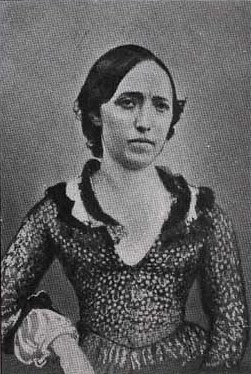 Andrea Marie Krætzmer, née Møller (1811-1889), Danish ballet dancer